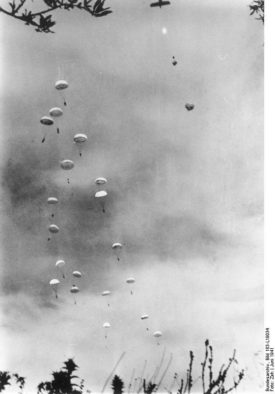 Fallschirmjäger schweben auf Kreta hinab. Die Fallschirmjäger haben eben ihre Transportmaschine verlassen. Die meisten dieser Absprünge spielten sich im heftigen Abwehrfeuer des Engländers ab. PK-Zeh-Scherl 3.6.1941